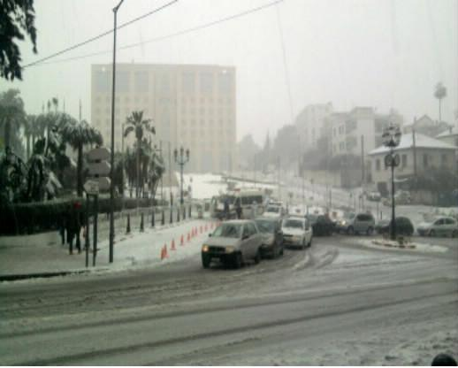 c'est el mouradia